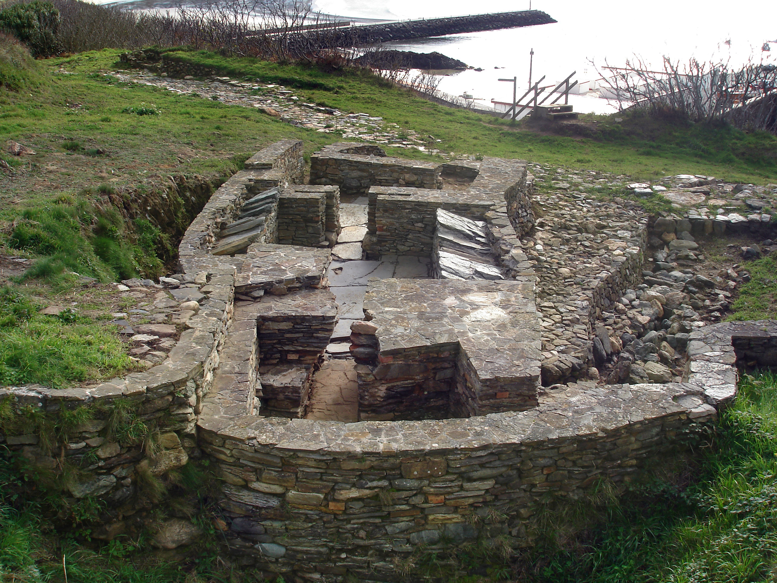 Monumento con Forno do Castro de Punta dos Prados en Espasante, no concello de Ortigueira.